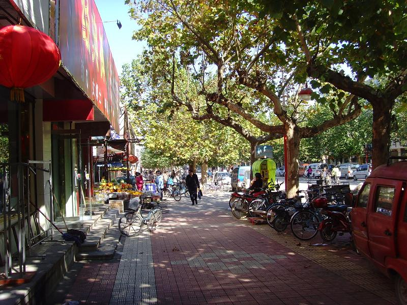 中国山东省济南市长清区街景